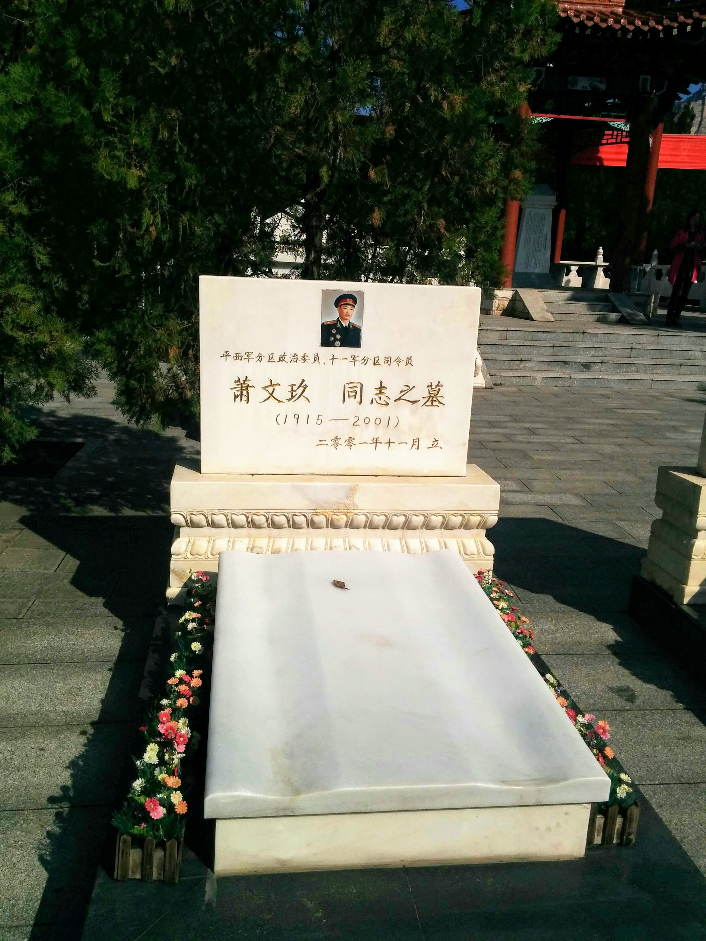 肖文玖之墓